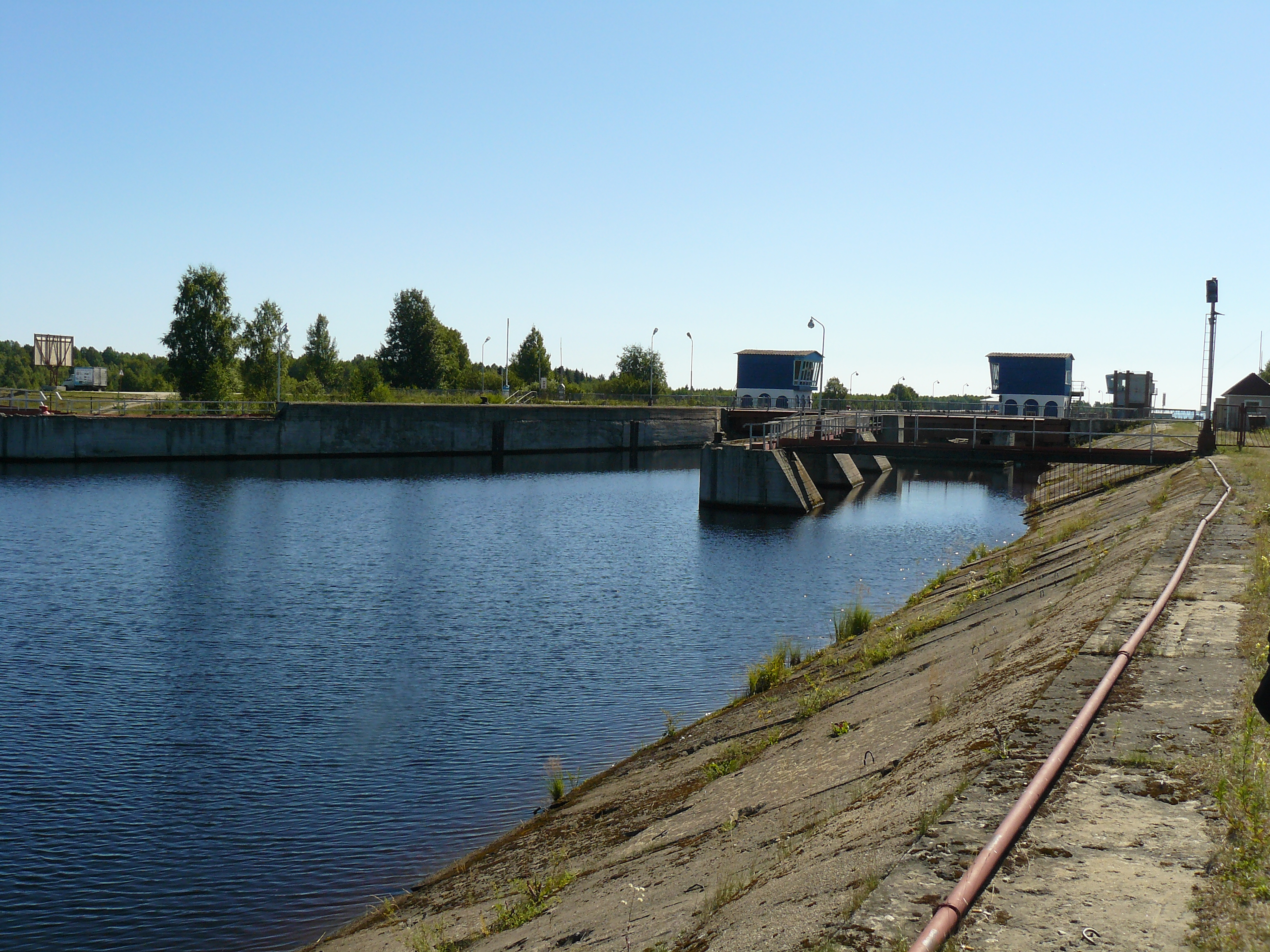 Біломорканал біля Медвеж'єгорська